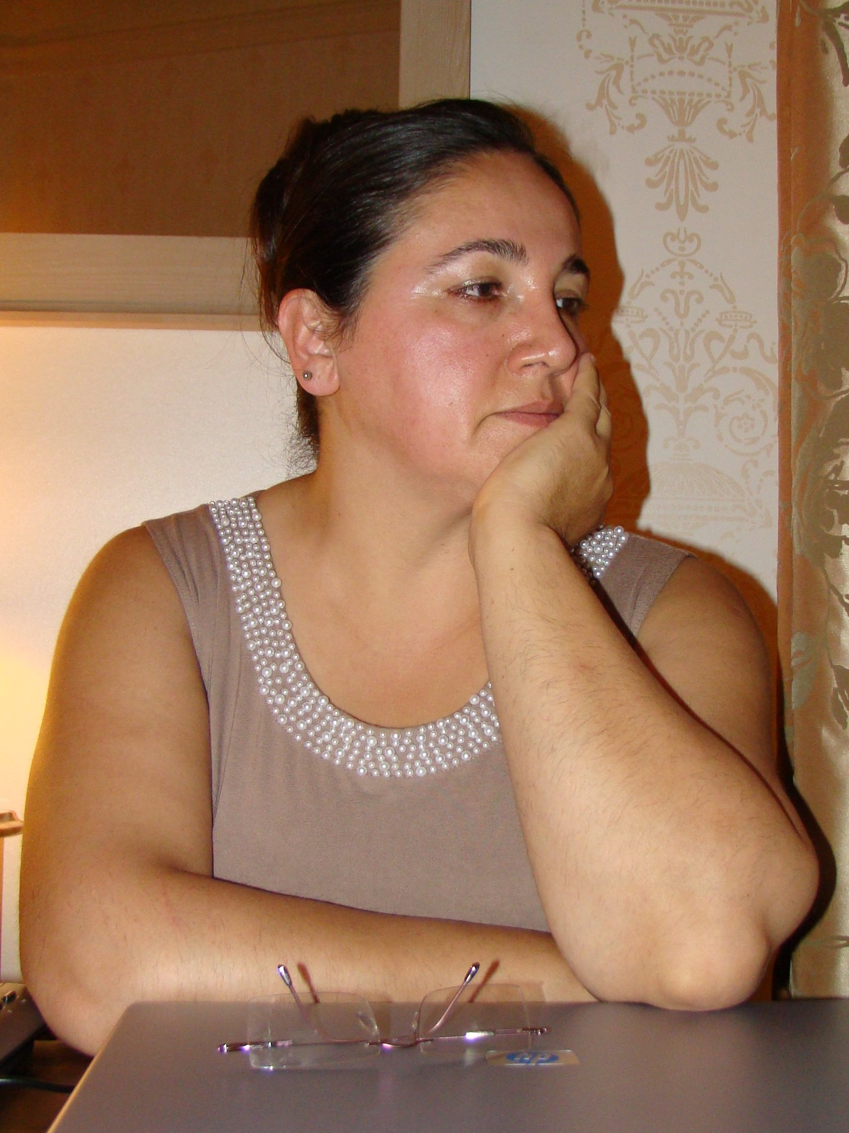 Sevê Evin Çiçek en 2010